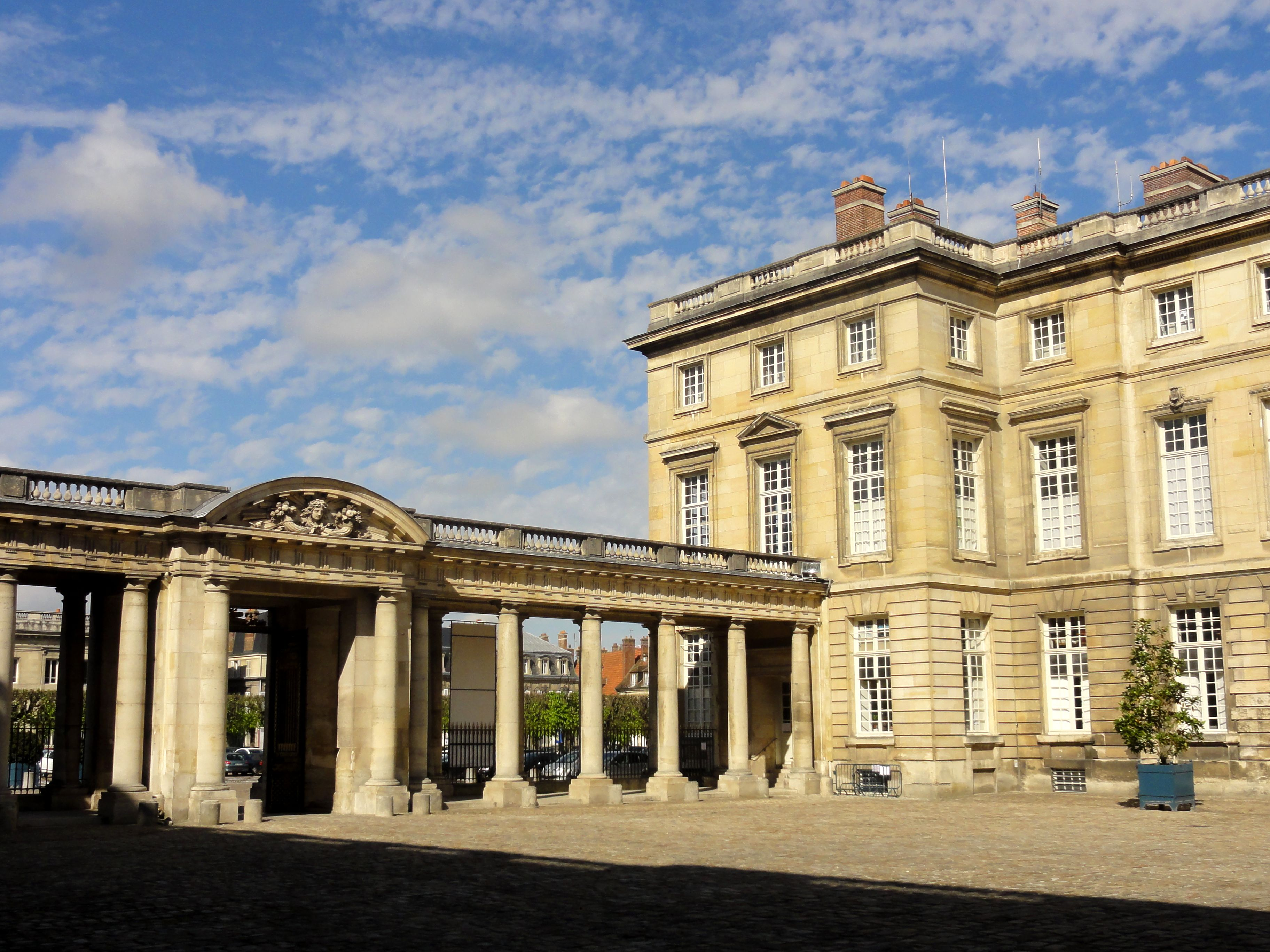 Cour d'honneur, côtés sud-ouest et nord-ouest.